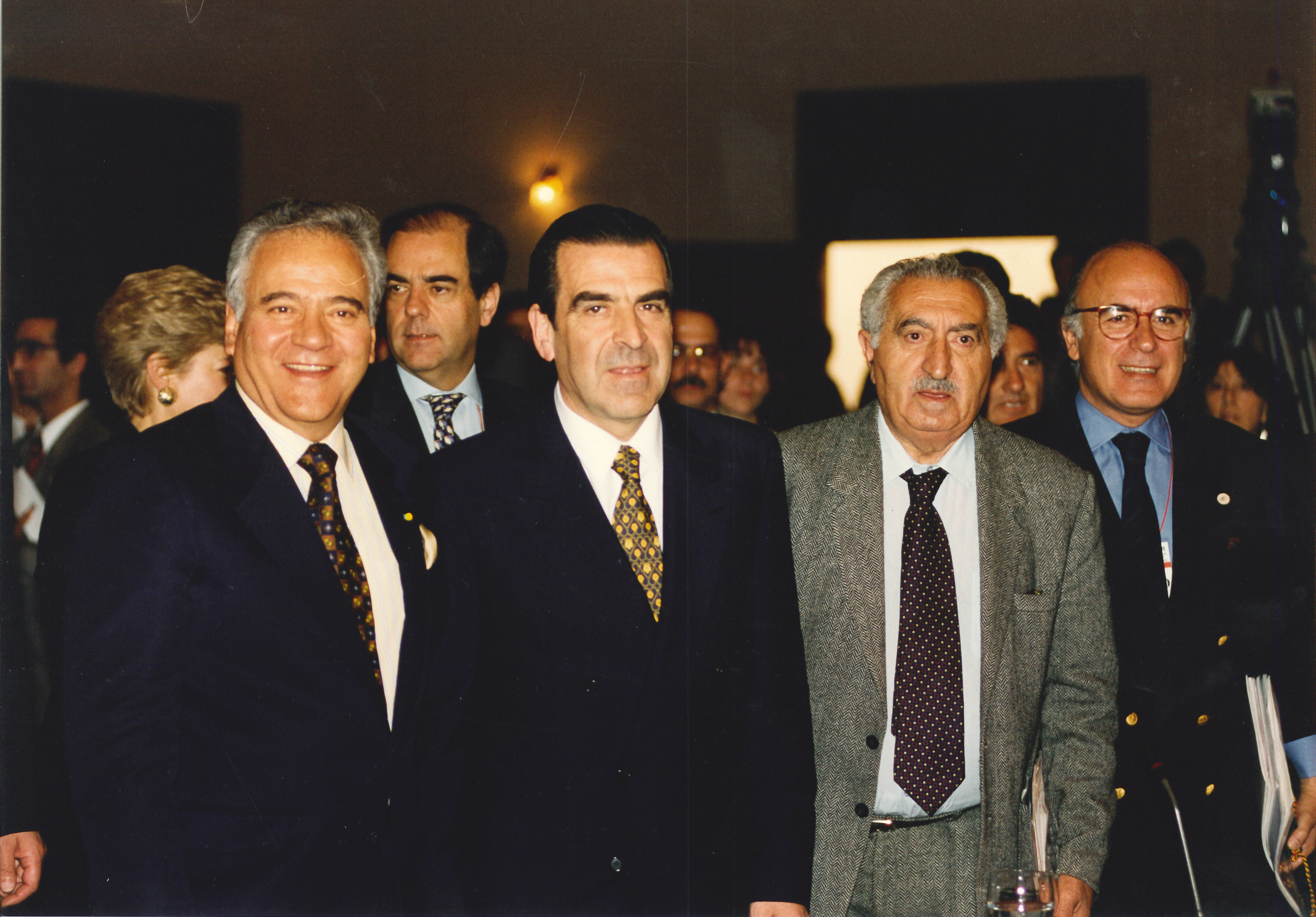 Alejandro Hales Jamarne acompaña al candidato presidencial Eduardo Frei Ruiz Tagle quien se presentó como representante de la Democracia Cristiana a las elecciones presidenciales de diciembre de 1993. 1993